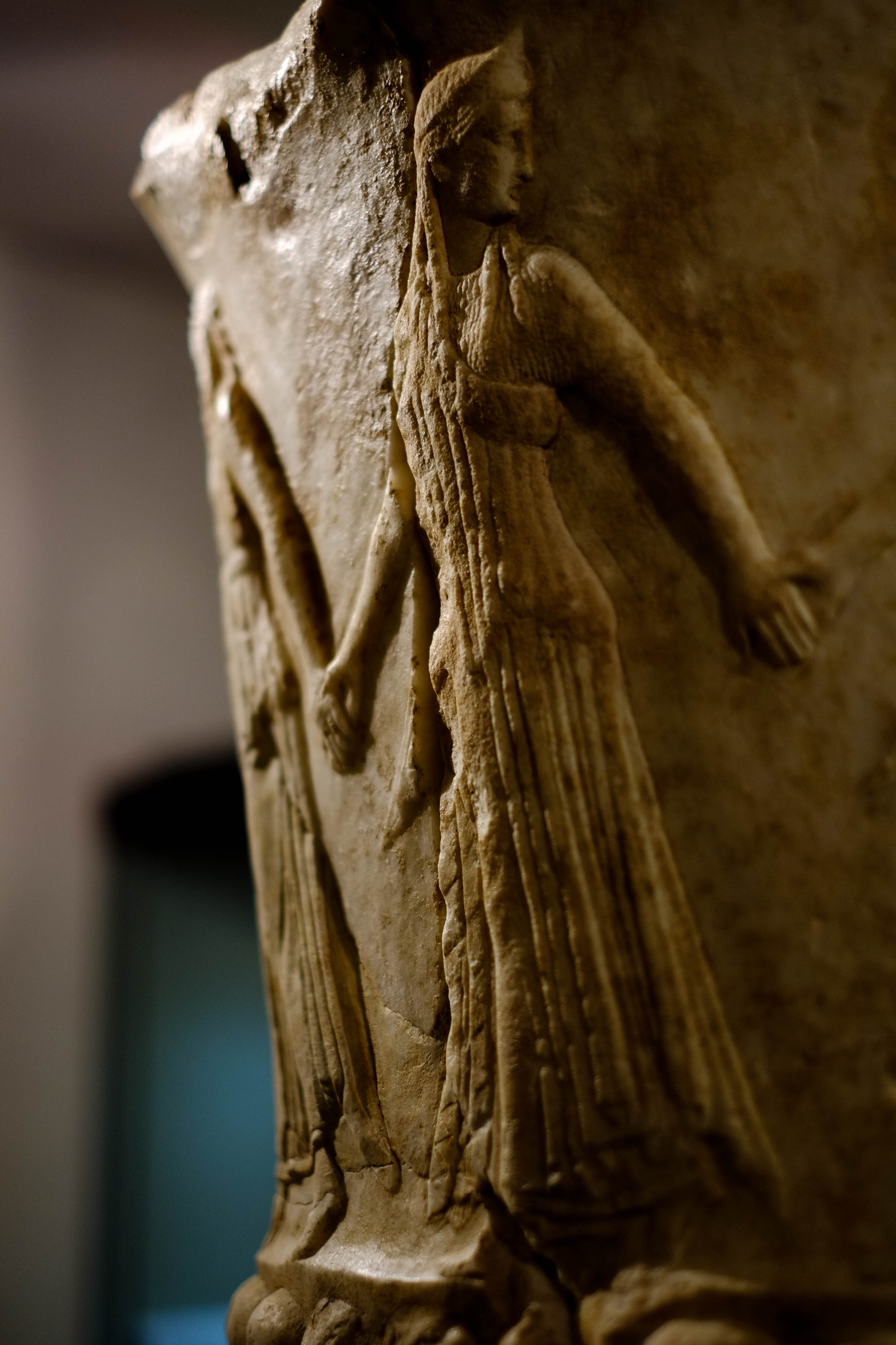 Museo Archeologico Statale di Urbisaglia - MIBAC This is a photo of a monument which is part of cultural heritage of Italy.